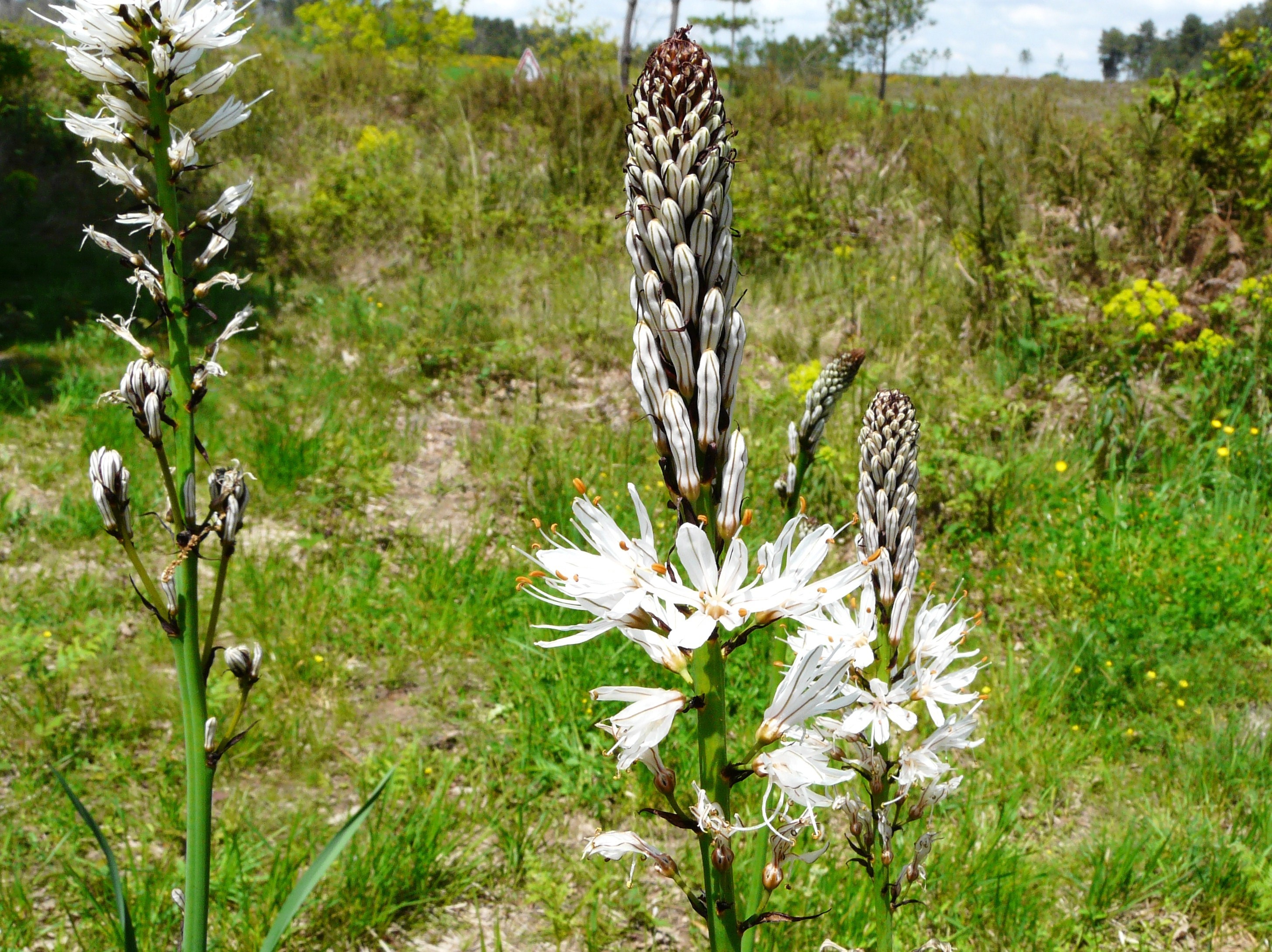 Inflorescences d'Asphodèle blanc (Asphodelus albus), forêt de la Double, Dordogne, France.